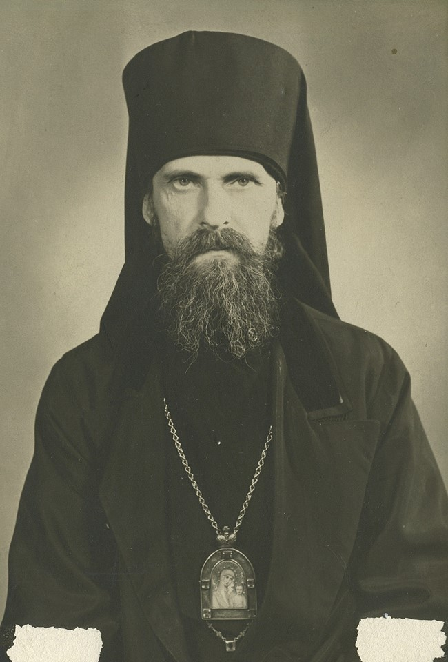 подпись на обратной стороне "Дорогому и любимейшему авве моему. Смиренный + Еп. Виталий Монреаль. 12 авг. 1959"